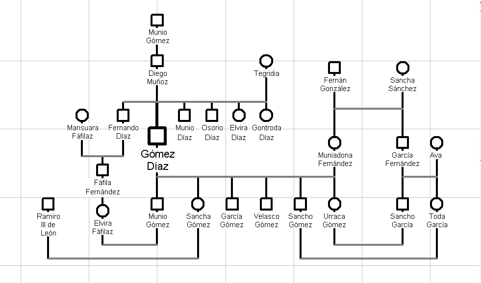 Origenes familiares de Gómez Díaz y uniones matrimoniales de sus descendientes. Referencias: *Martínez Díez, Gonzalo (1995). «La familia condal de Carrión», Actas del III Congreso de Historia de Palencia (vol. 2). *Torre Sevilla-Quiñones de León., Margarita Cecilia (1985). Linajes nobiliarios de León y Castilla: Siglos IX-XIII.